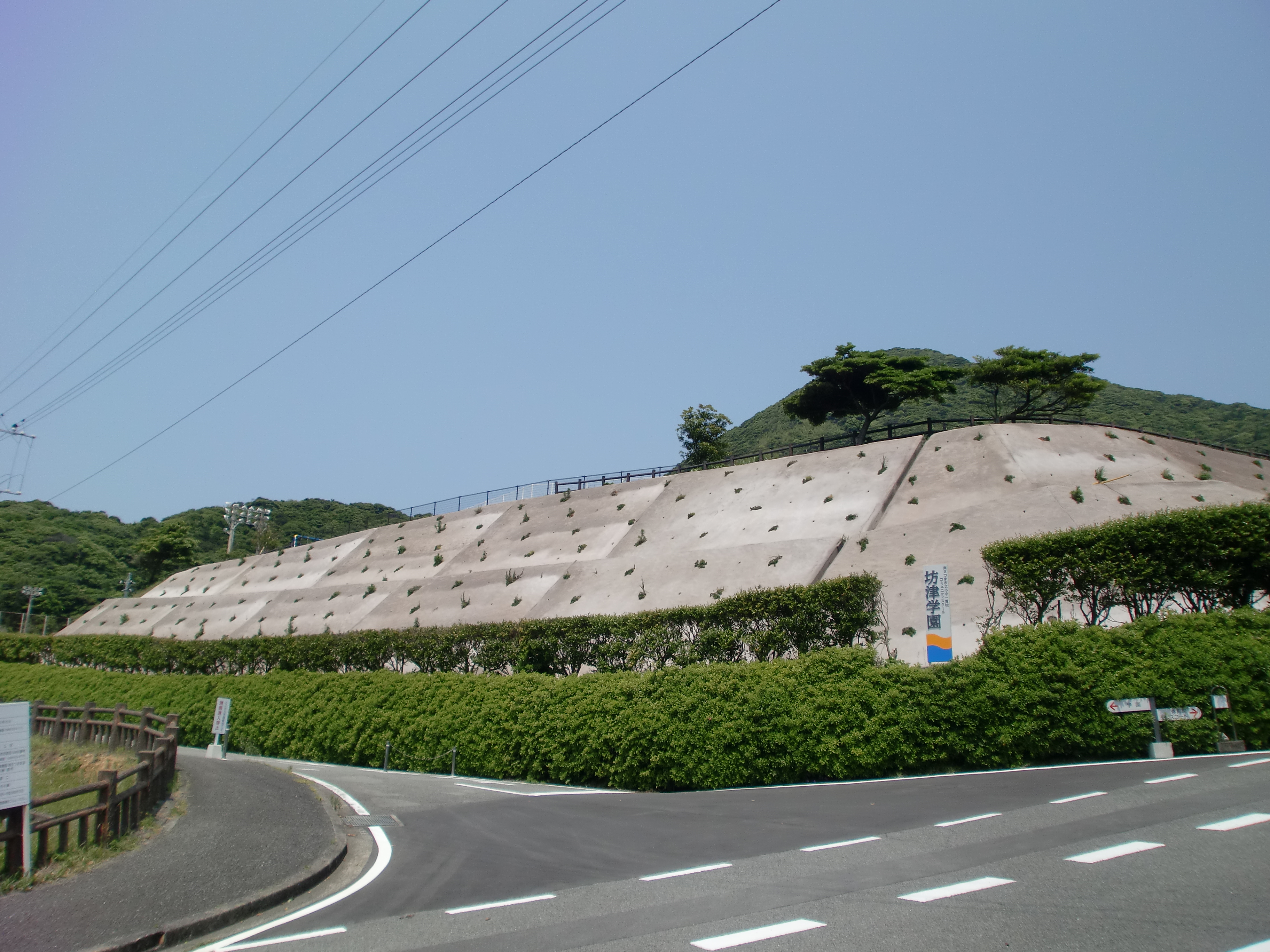 南さつま市立坊津学園（南さつま市立坊津学園小学校・南さつま市立坊津学園中学校）の出入り口。